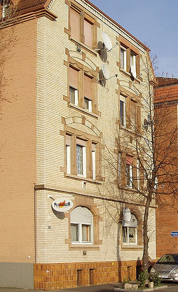 Ausschnitt aus unten genannter Quelle